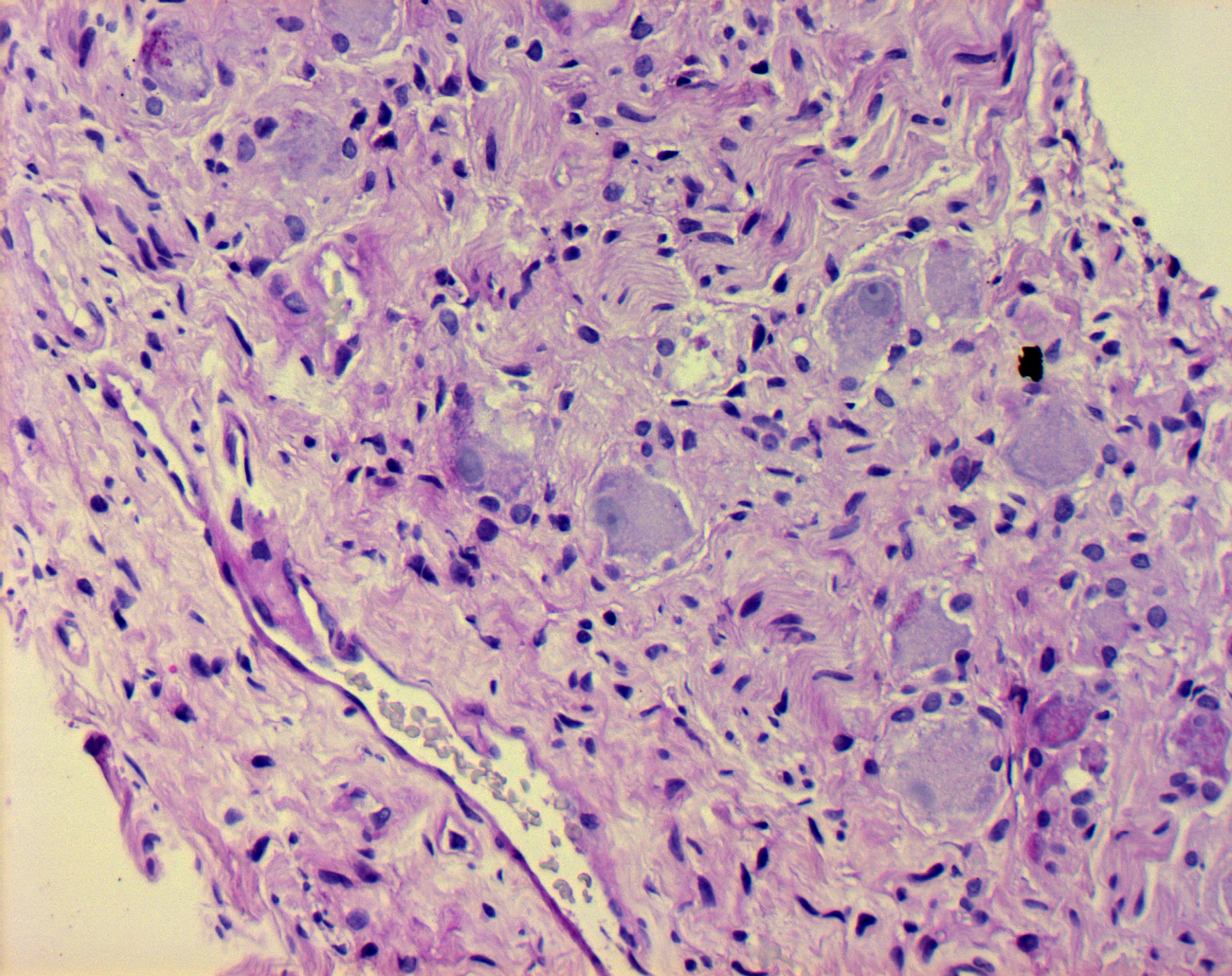 Histologie des Ganglioneuroms (stanzbioptisch gewonnene Probe eines paravertebralen mediastinalen Tumors bei einem 16-jährigen weiblichen Patienten) mit reifen Ganglienzellen und spindelförmigen Schwann-Zellen.